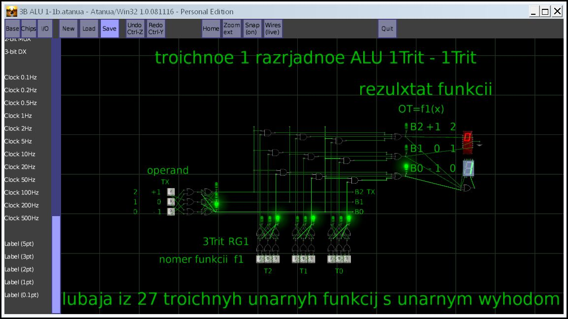 Снимок модели троичного унарного с унарным выходом АЛУ (1Трит-1Трит) в трёхбитной одноединичной системе троичных логических элементов в логическом симуляторе Atanua.